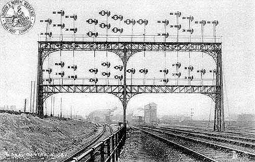 Rugby signalling gantry.